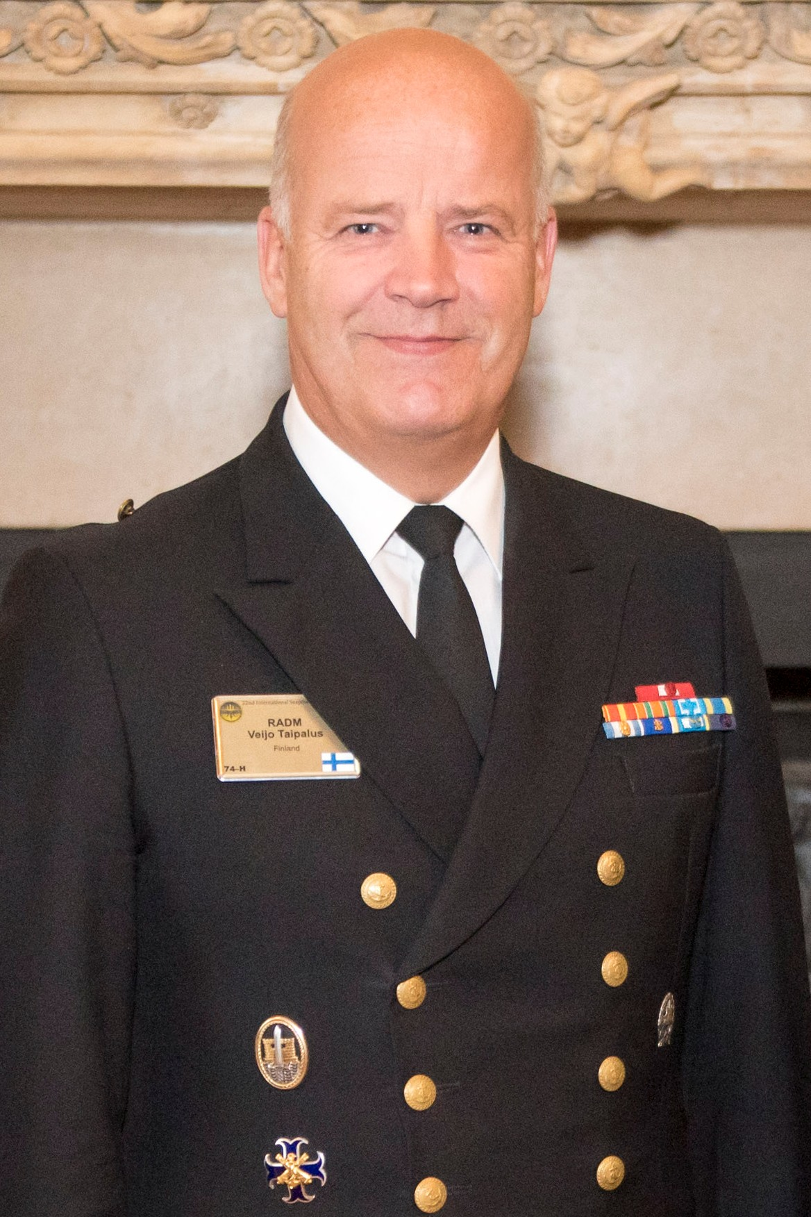 Veijo Taipalus